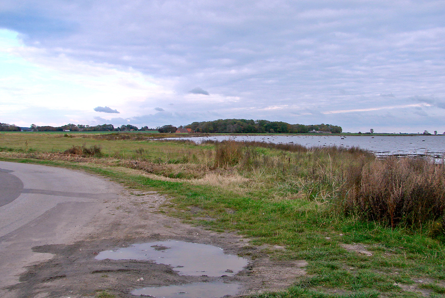 Alrø i Horsens Fjord set fra sydvest